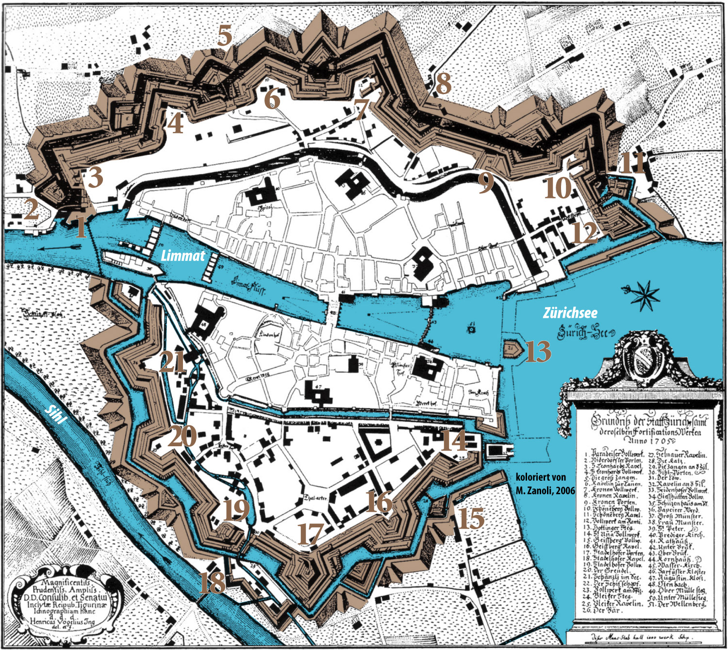 Die 3. Stadtbefestigung von Zürich, nachträglich kolorierter Stich von Heinrich Vögelin, 1705. Braun die nach Plänen Werdmüllers ab 1642 angelegten Schanzen. Legende siehe im Artikel Stadtbefestigung (Zürich)